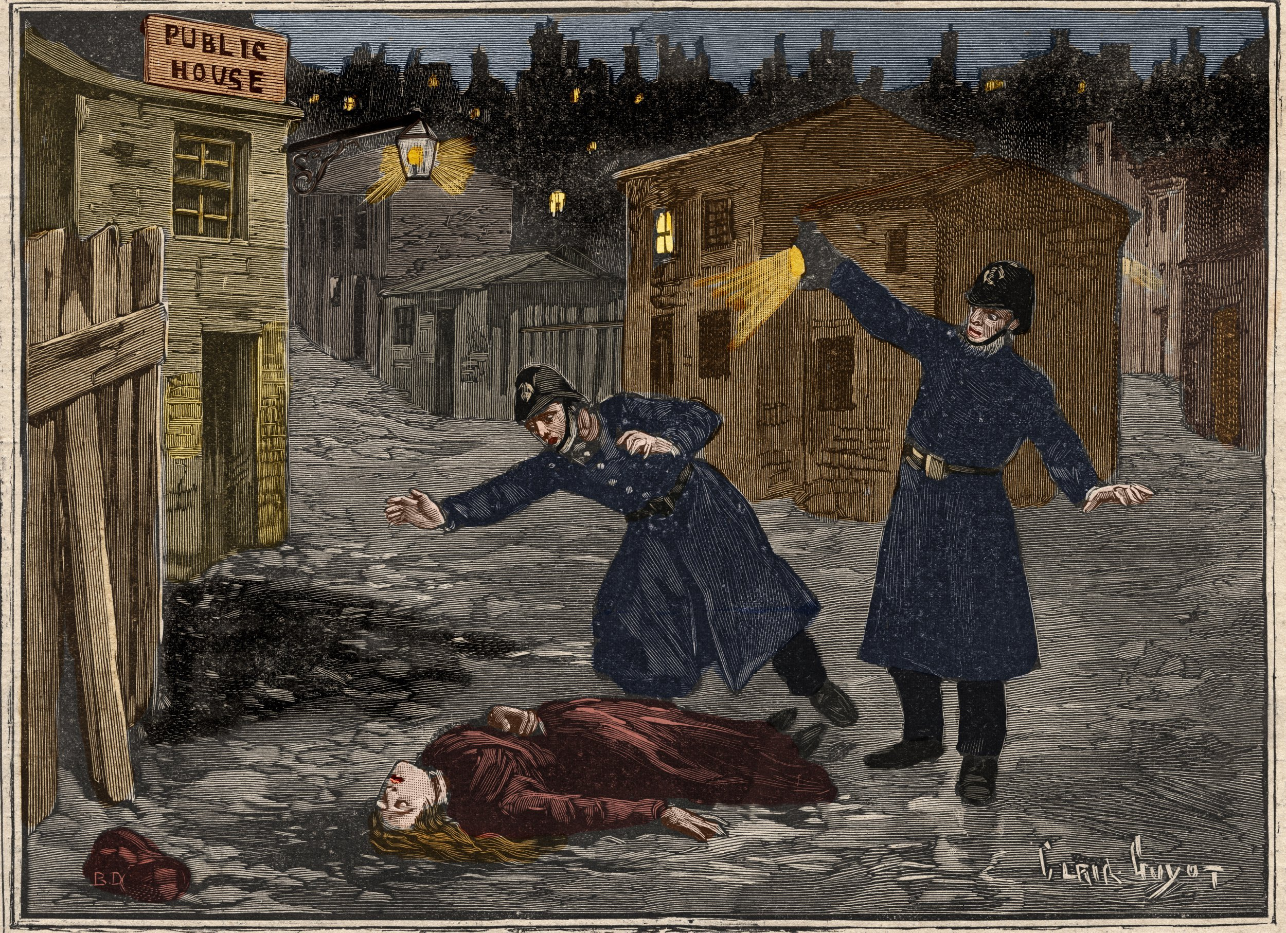 Une rue de Whitechapel - Le dernier crime de Jack l'Éventreur, illustration d'Ernest Clair-Guyot publiée dans le Supplément littéraire illustré du Petit Parisien, 22 février 1891, p. 8 [1].